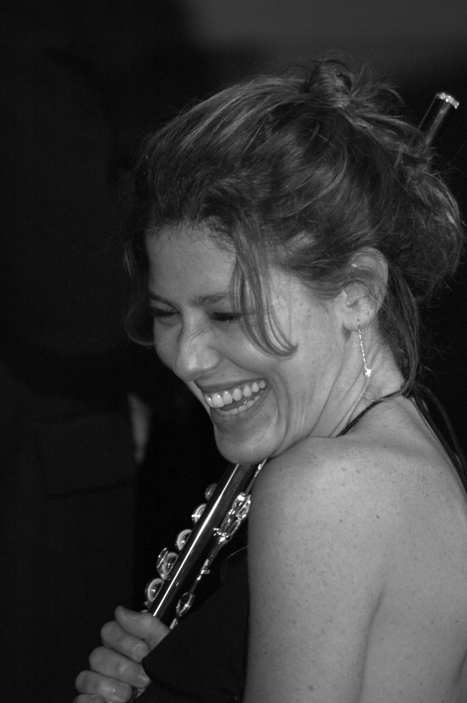 Silvia Careddu, flûtiste italienne